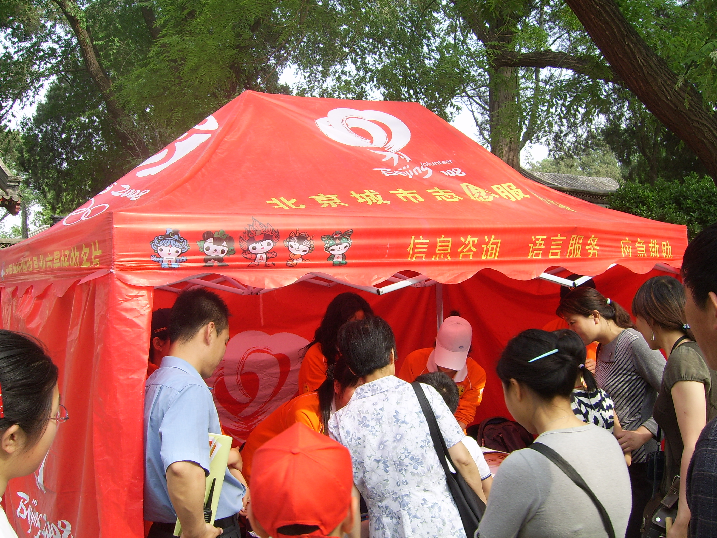 2008年夏季奥林匹克运动会的志愿者在北京的公园的宣传活动